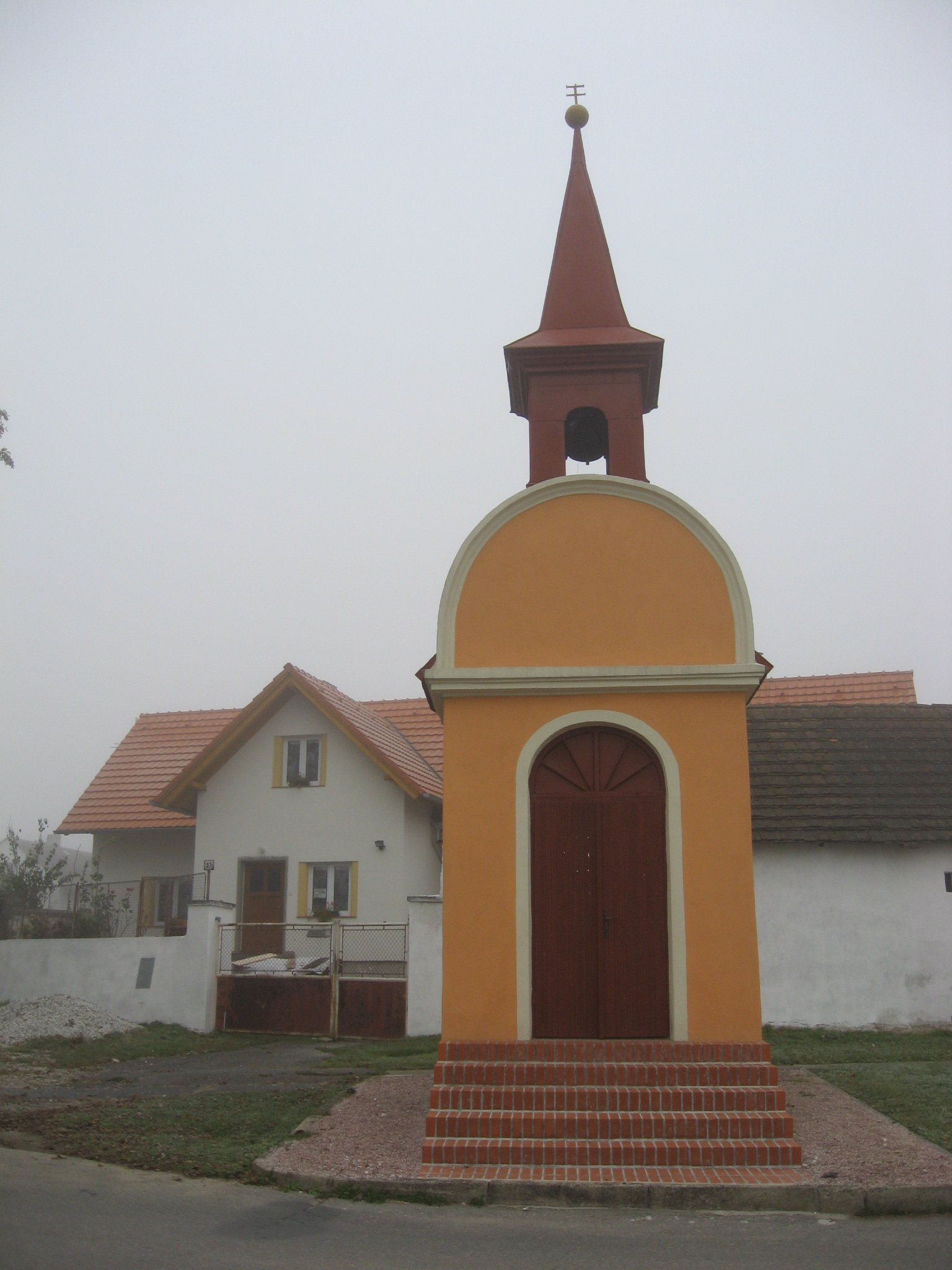 Kaplička na návsi v obci Dolní Poříčí, okr.Strakonice